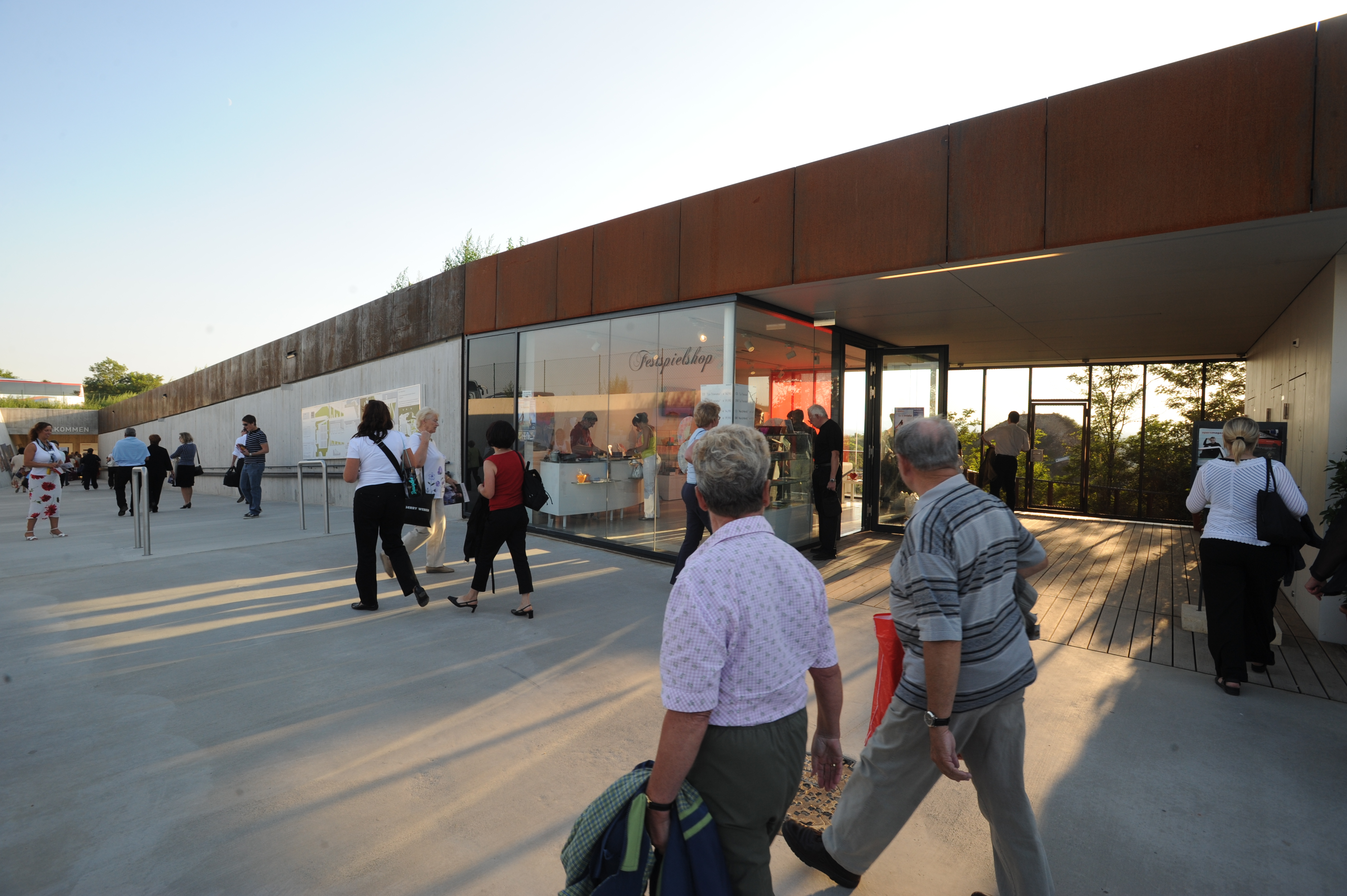 Der Eingangsbereich ins Festspielgelände